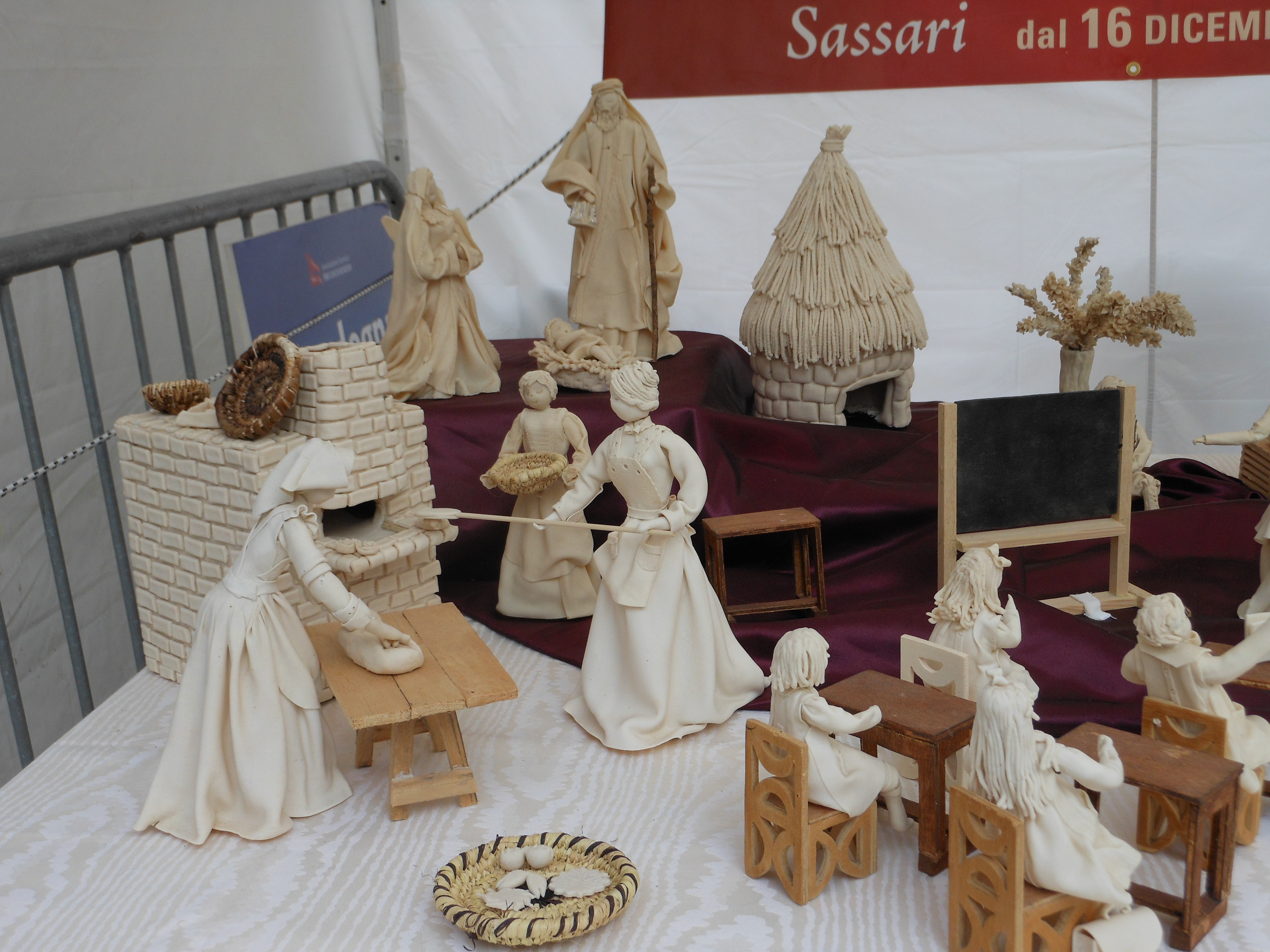 Pane tradizionale